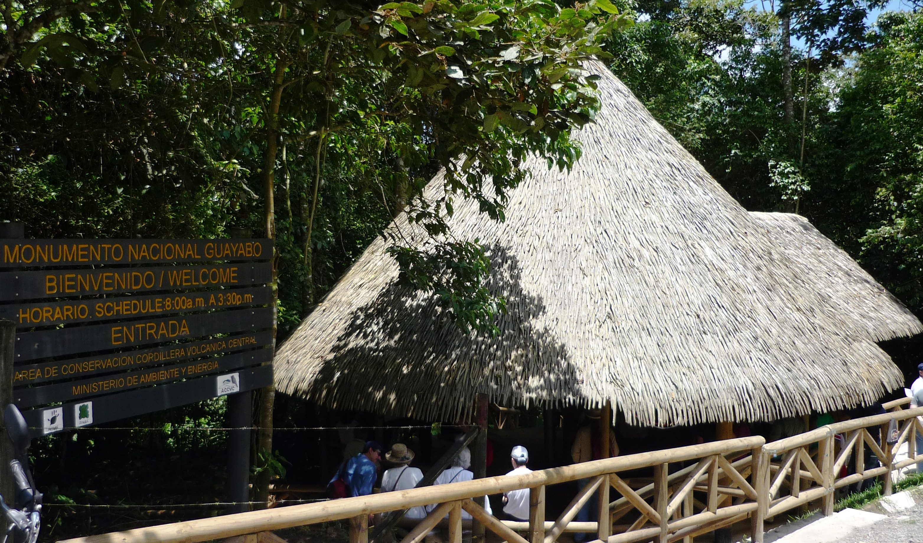 Recepción y entrada principal al Parque Nacional Manuel Antonio, hecho bajo la Dirección Técnica del Arq. Ibo Bonilla